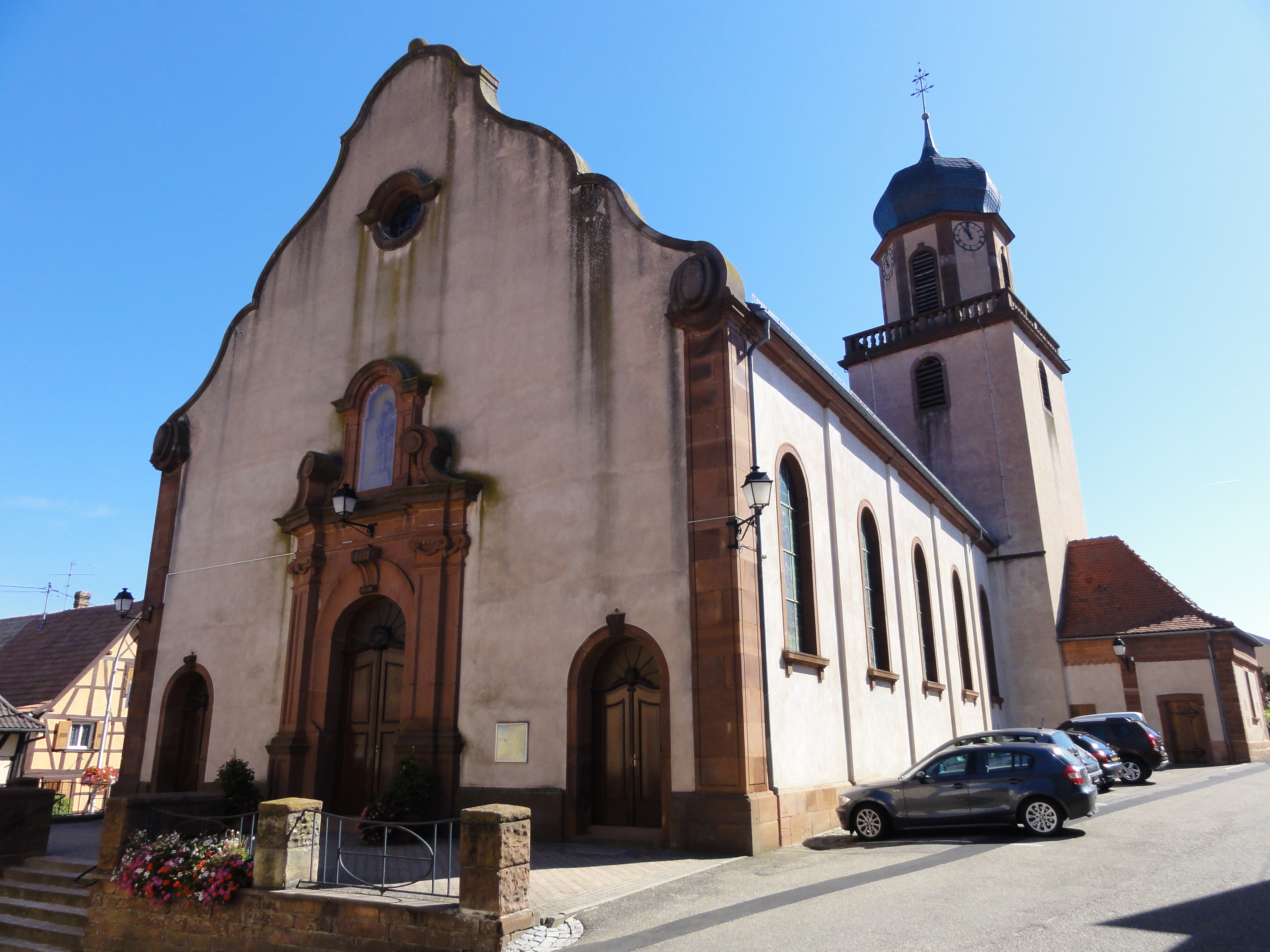 Alsace, Bas-Rhin, Église Saint-Georges